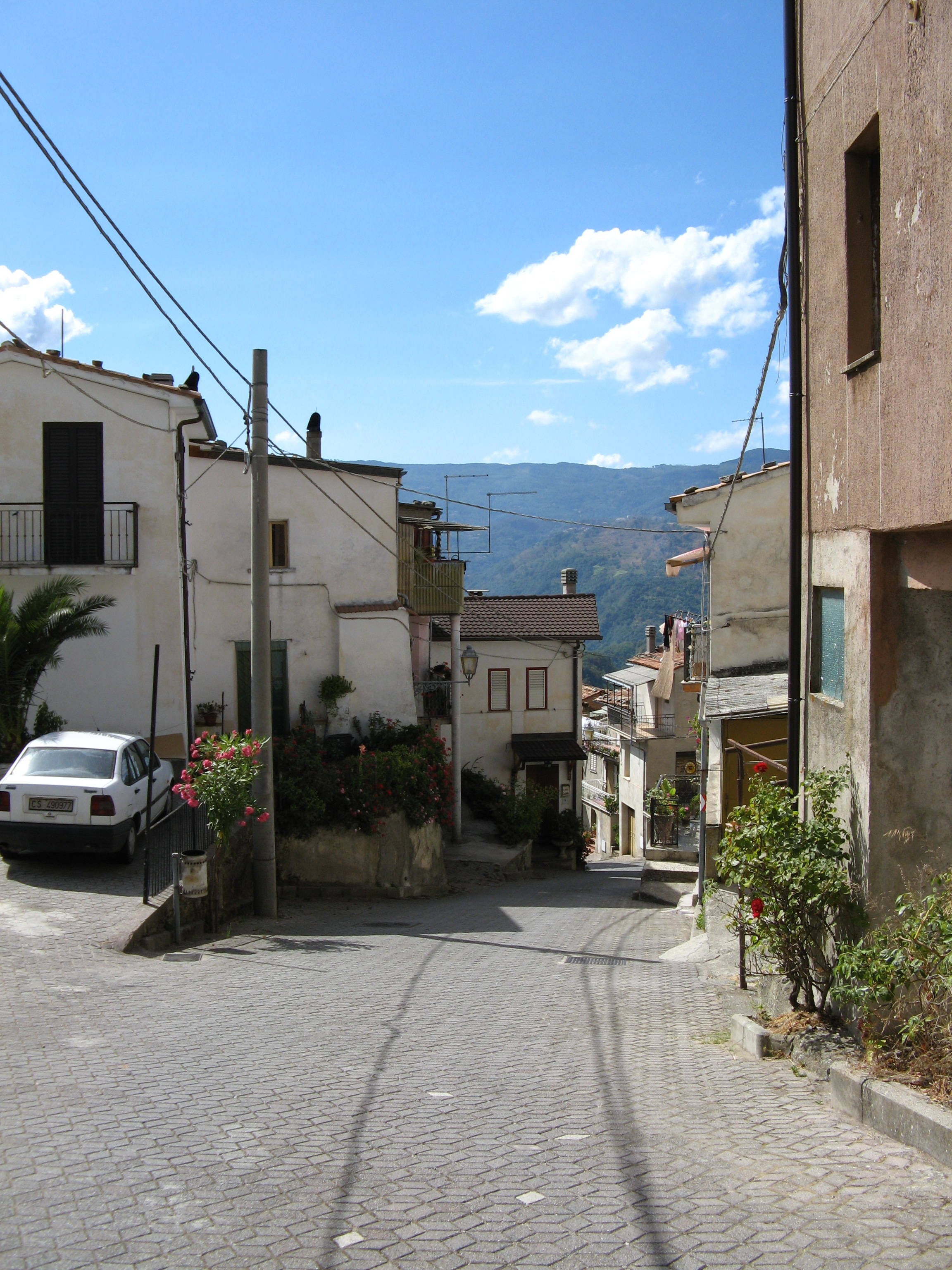 Pittarella, scorcio del centro storico